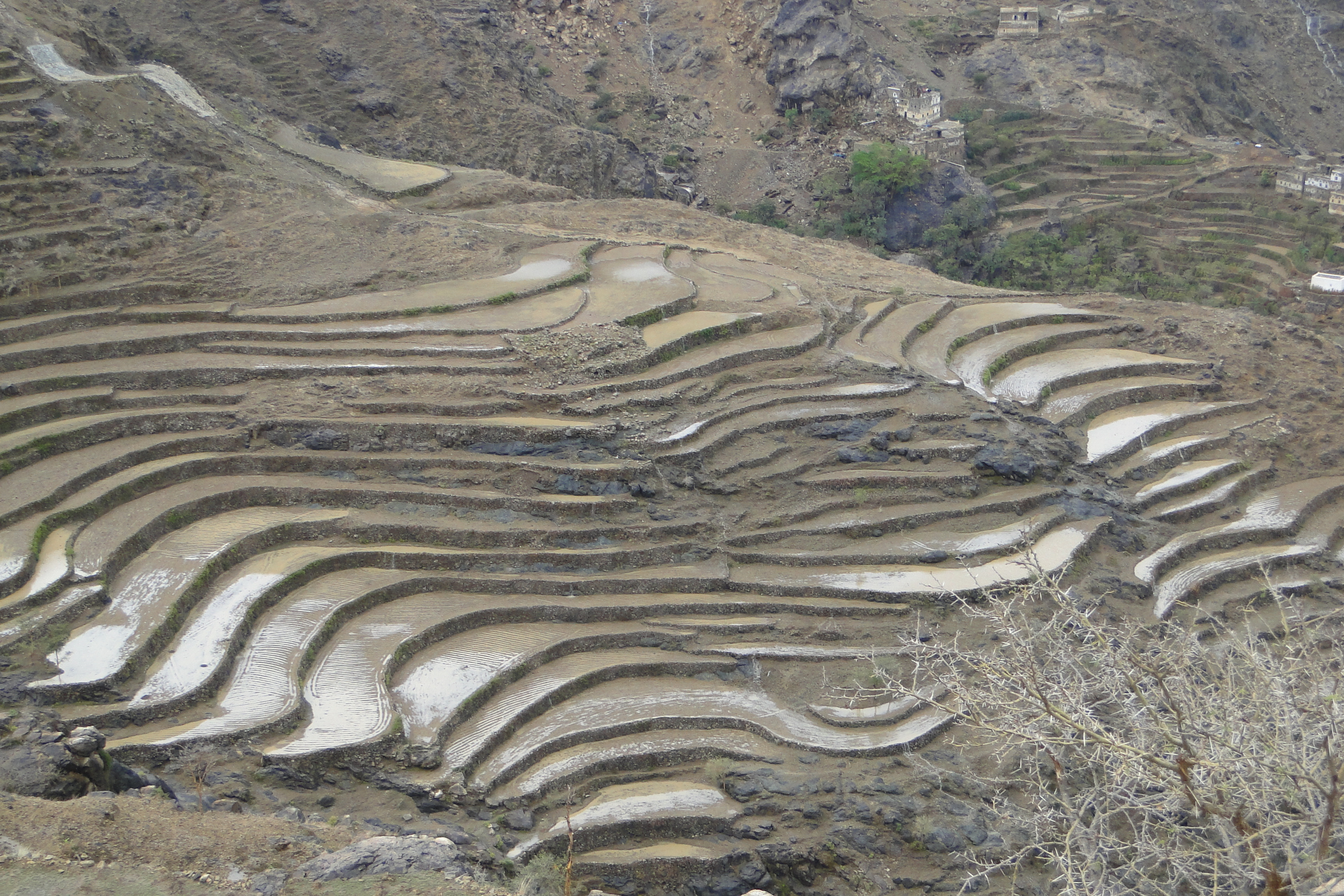 الحقول الزراعية بعد الامطار محافظة ريمه بني الضبيبي البرار بني رضوان